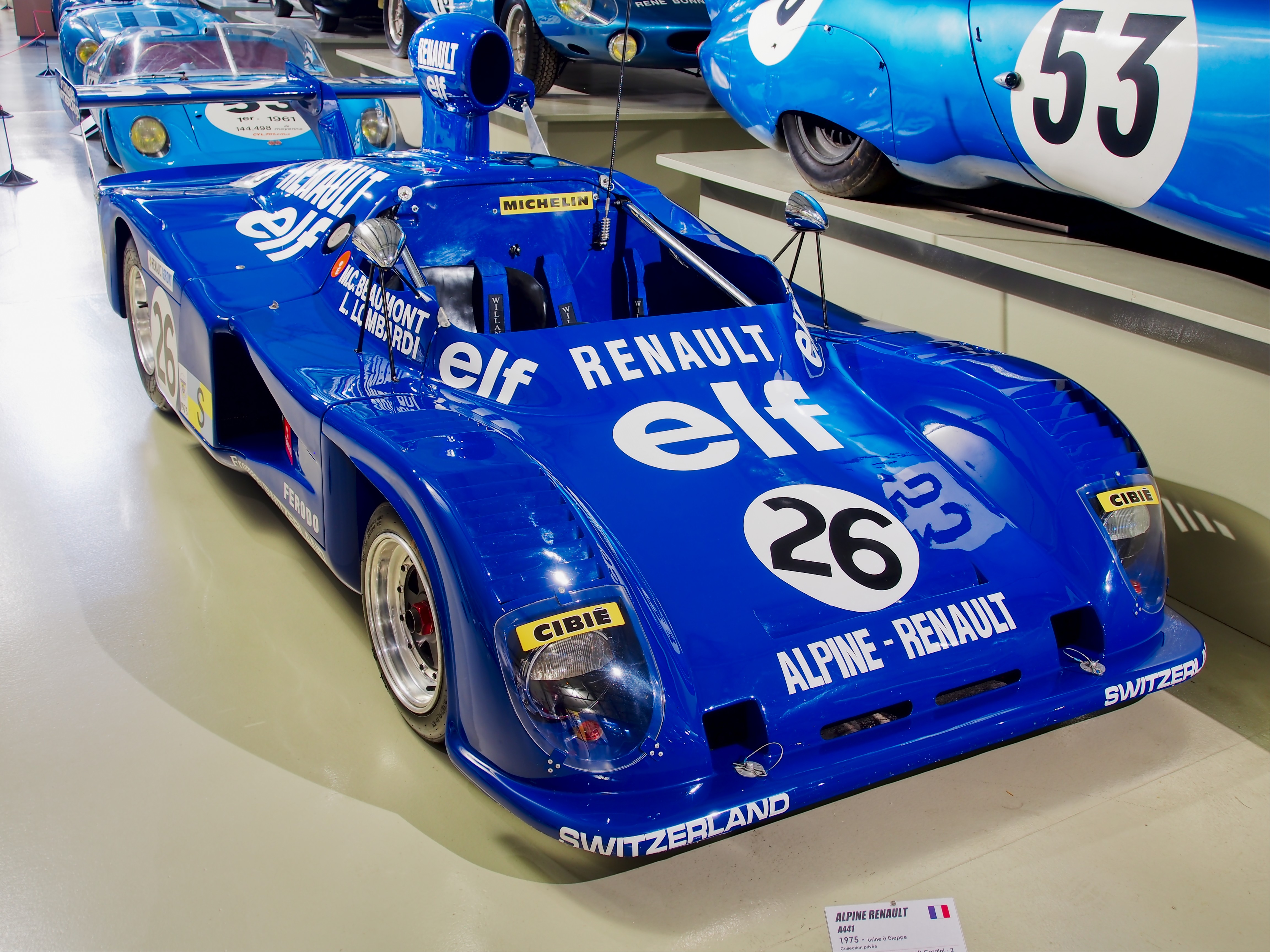 Photographed at Musée des 24 Heures du Mans, France.